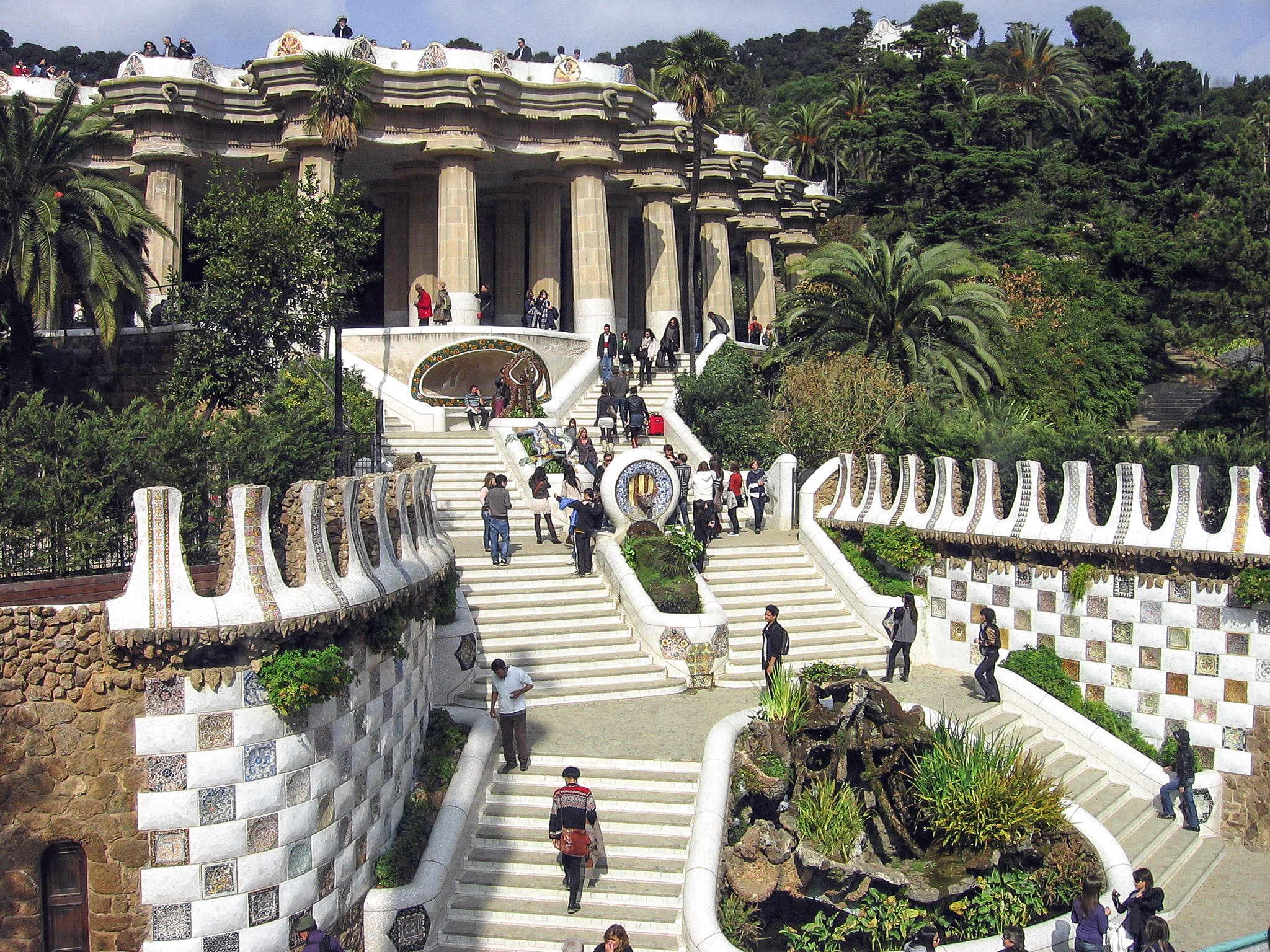 Entrada al Parque Güell.